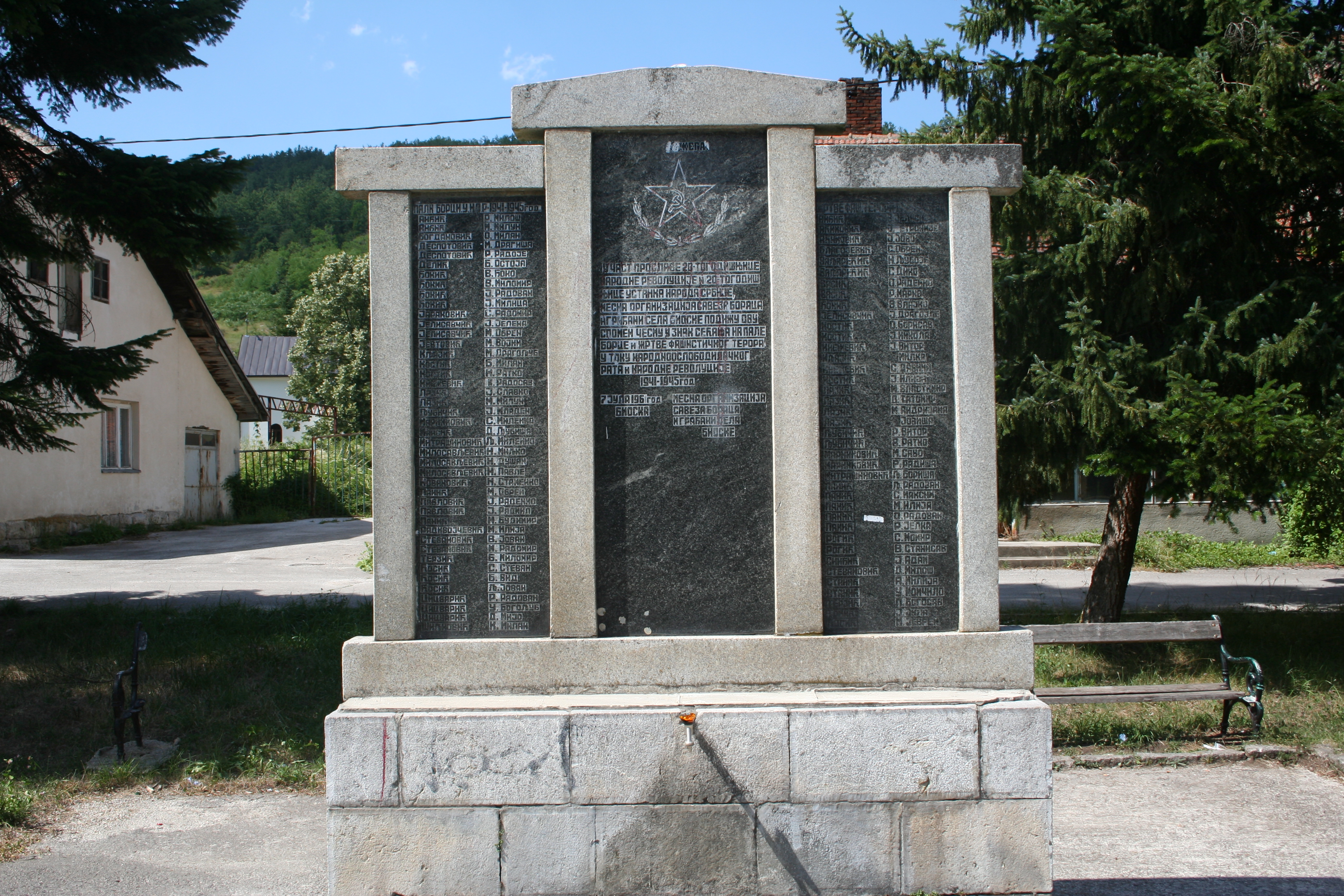 Bioska, centar sela